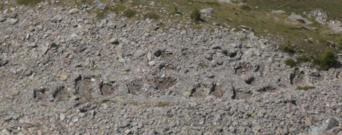 Vista dall’alto del Villaggio dei Salassi del Monte Tantané, La Magdeleine, Valle d'Aosta, Italia.